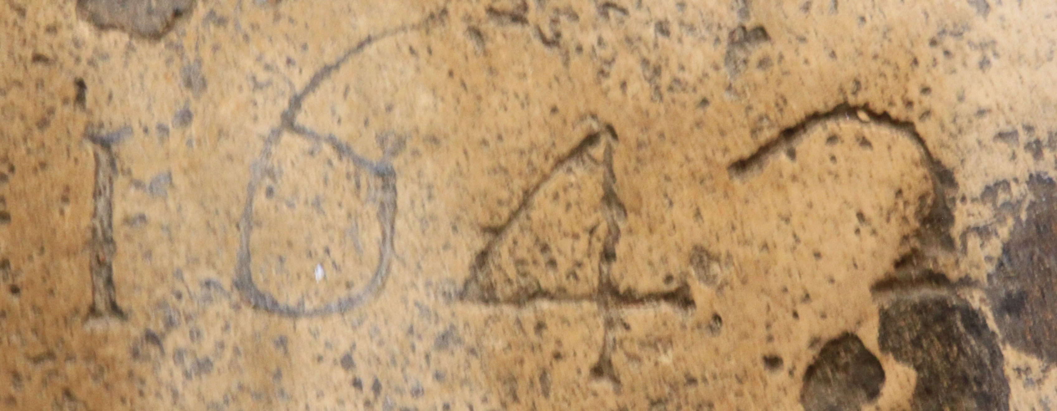 Fragment d'una làpida del monestir de Sant Pere de Besalú amb la inscripció de l'any 1642.